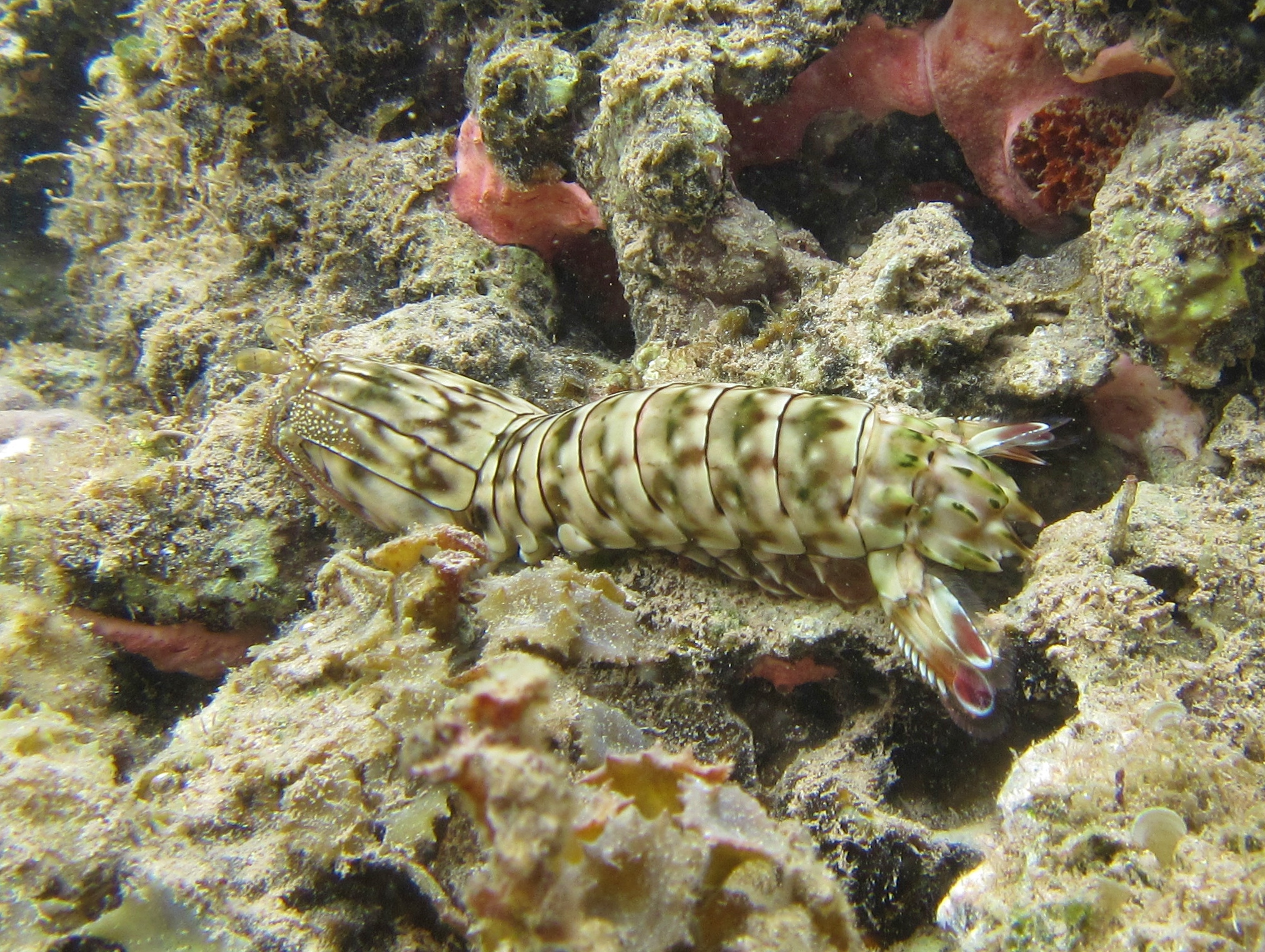 Une crevette-mante frappeuse Gonodactylus chiragra à Mayotte, sur le platier de Papani. Détermination : T. Claverie.